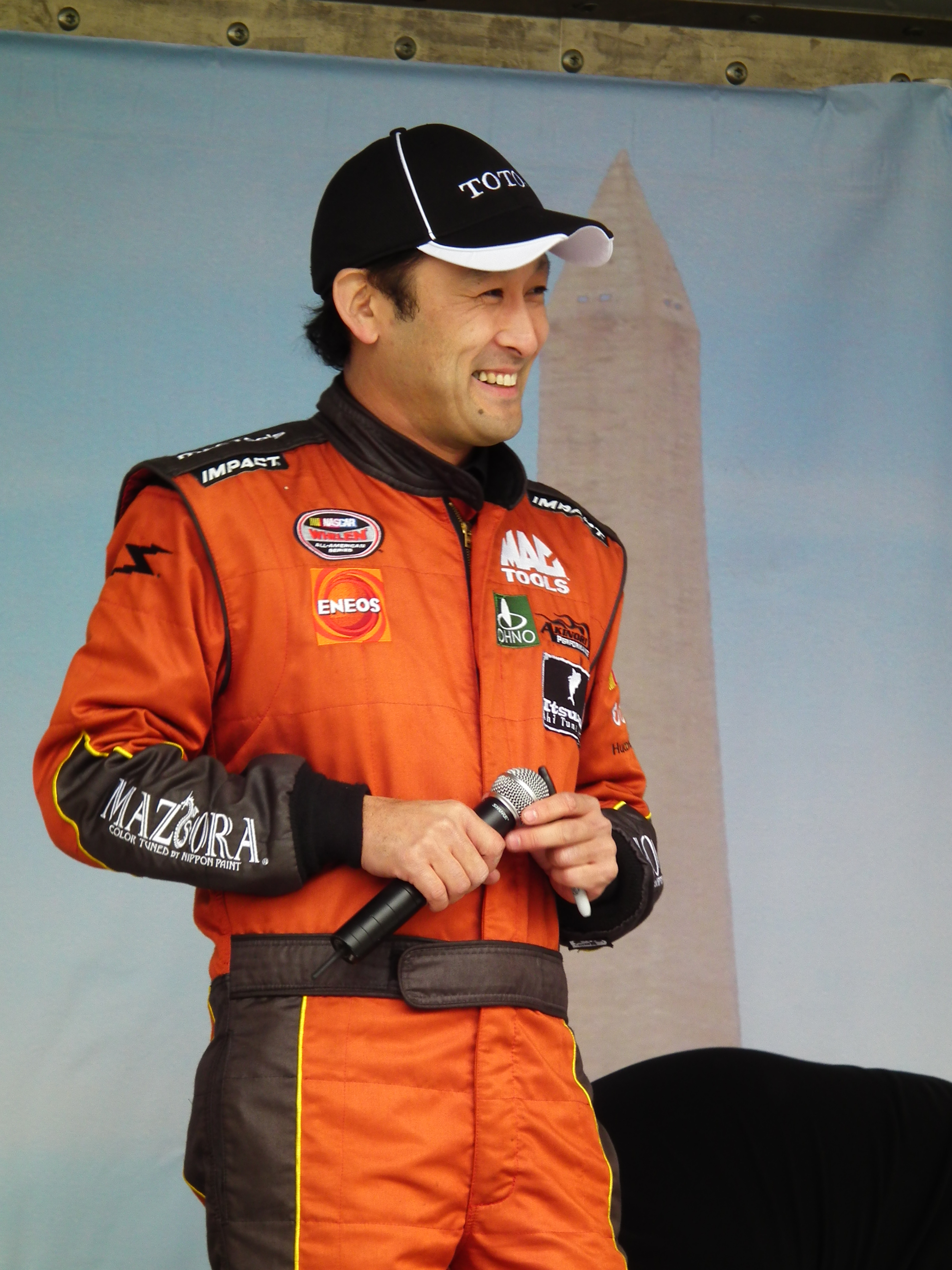 Japanese nascar driver